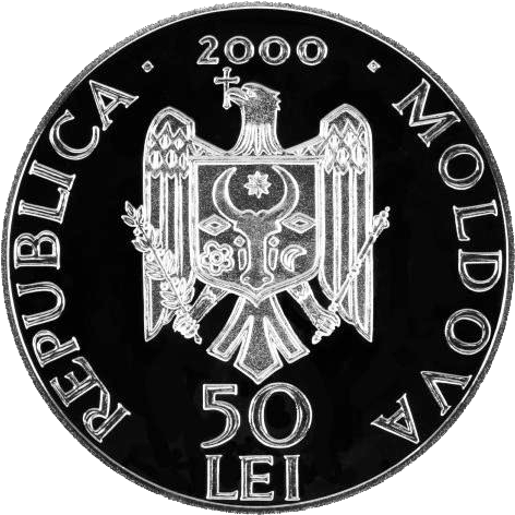 Аверс памятных монет серии "Монастыри Молдавии"